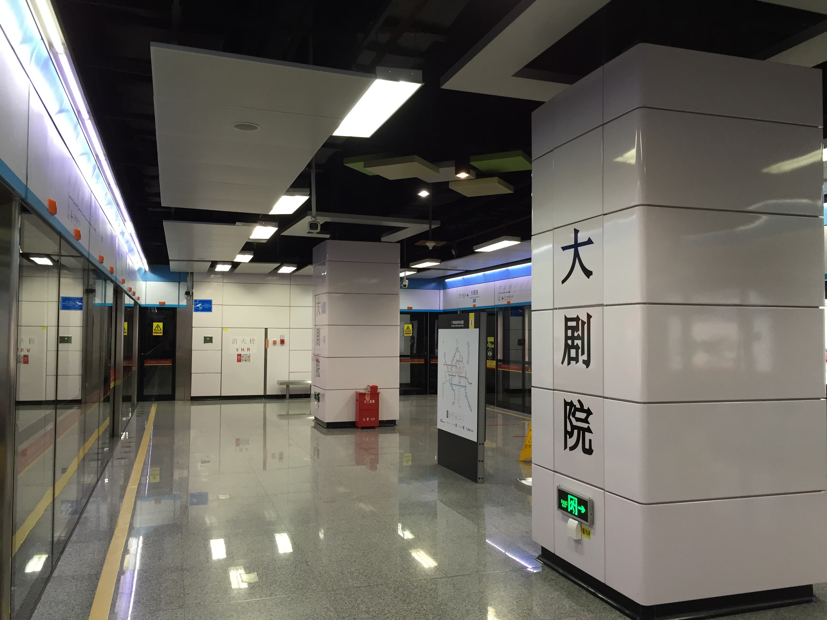 广州地铁大剧院站